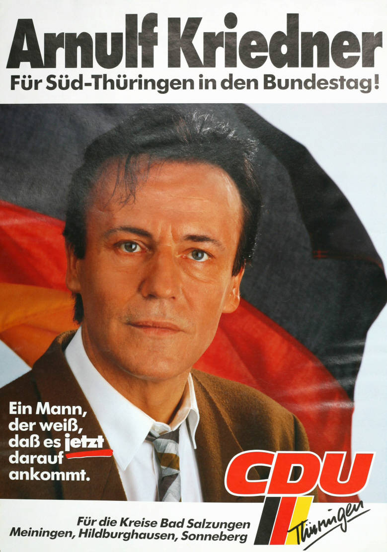 Arnulf Kriedner Für Süd-Thüringen in den Bundestag! Ein Mann, der weiß, daß es jetzt darauf ankommt. Für die Kreise Bad Salzungen Meiningen, Hildburghausen, Sonneberg CDU Thüringen Abbildung: Porträtfoto vor Deutschlandfahne Plakatart: Kandidaten-/Personenplakat mit Porträt Objekt-Signatur: 10-001: 3503 Bestand: Plakate zu Bundestagswahlen (10-001) GliederungBestand10-18: Plakate zu Bundestagswahlen (10-001) » Die 12. Bundestagswahl am 2. Dezember 1990 » CDU » Mit Porträtfoto Lizenz: KAS/ACDP 10-001: 3503 CC-BY-SA 3.0 DE